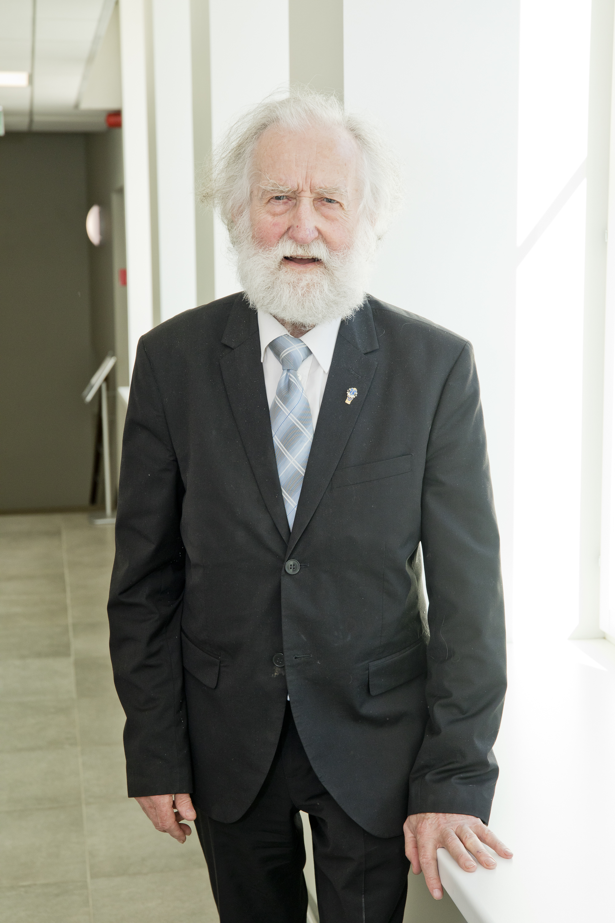 Ülo Vooglaid Eesti Rahvusringhäälingus